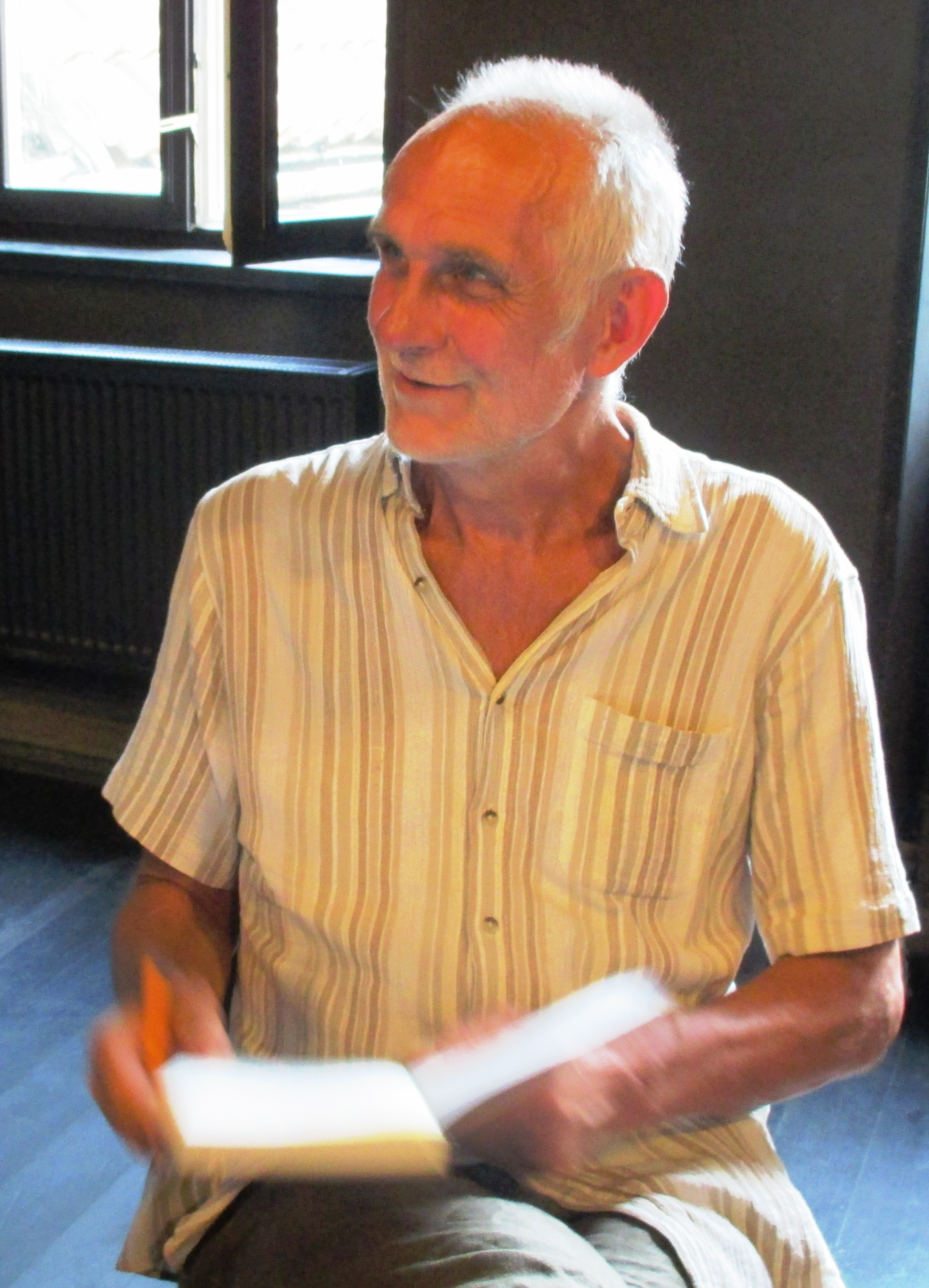 Ян Доктур, польський історик, працівник Єврейського історичного інституту